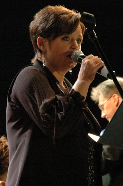 Hanna Banaszak podczas I Festiwalu Kultury im. Marka Grechuty w Zamościu